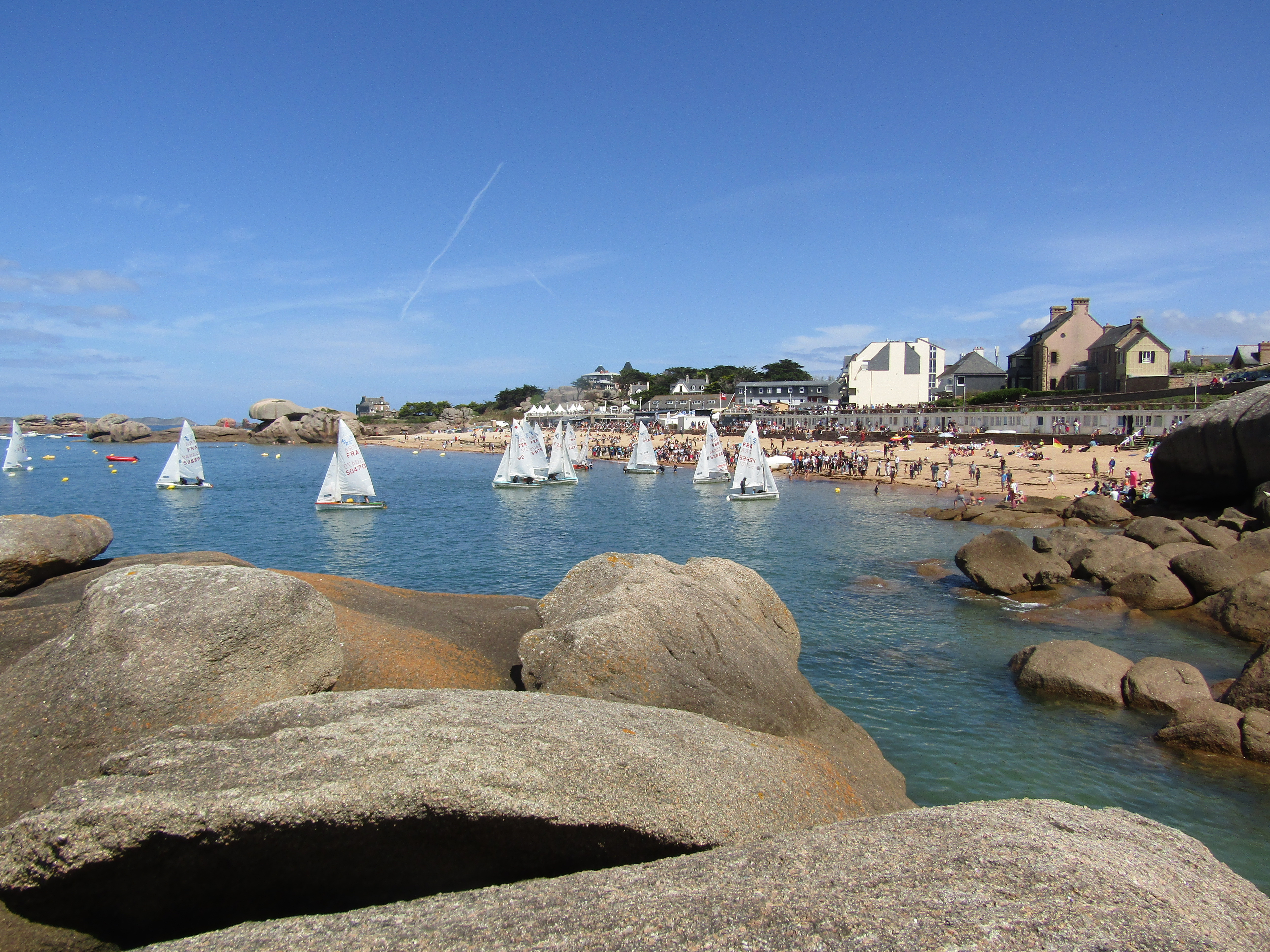 24h voile 2010 vue de la plage